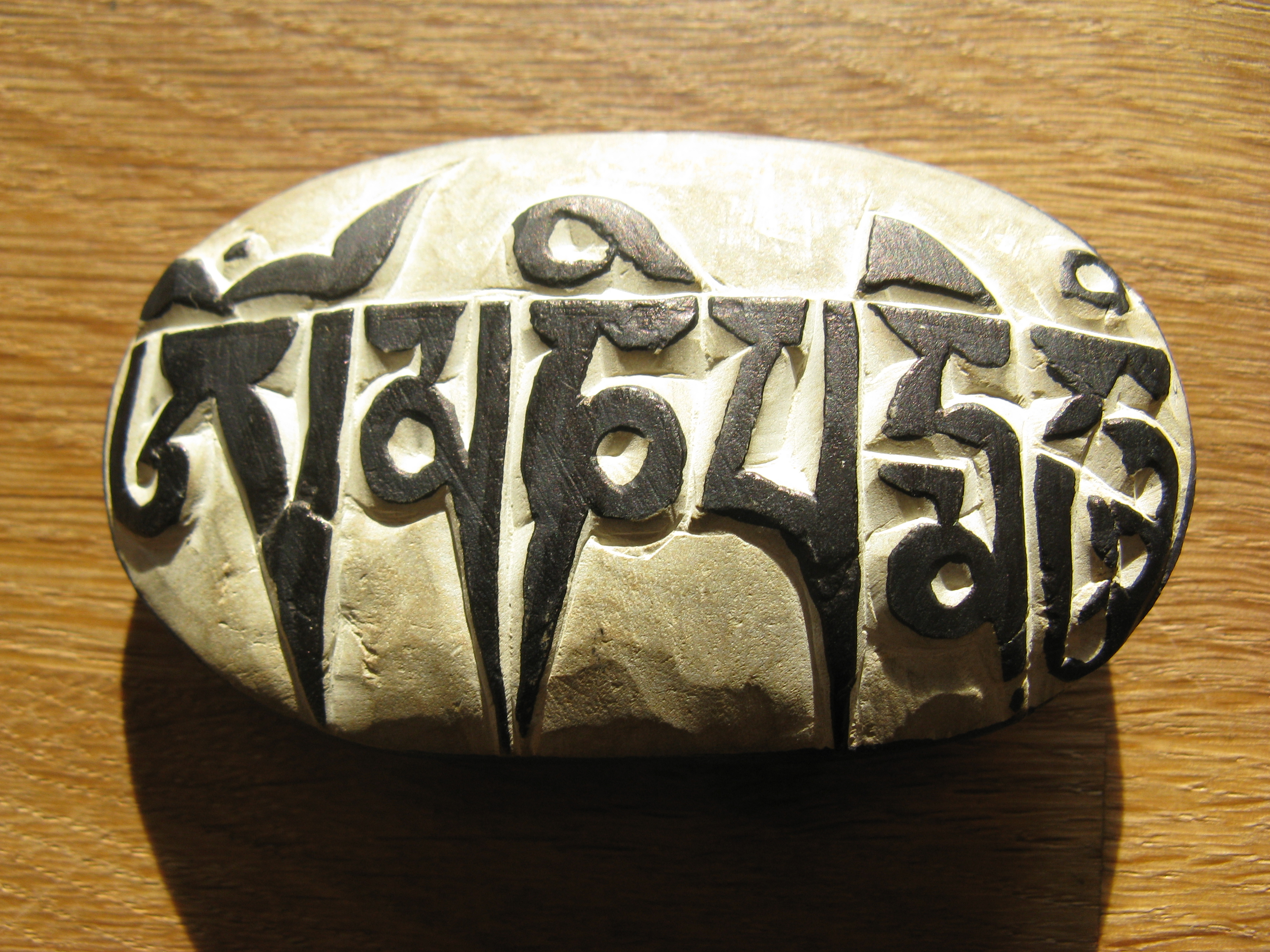 Om mani padme hum (Tibetisches Mantra)